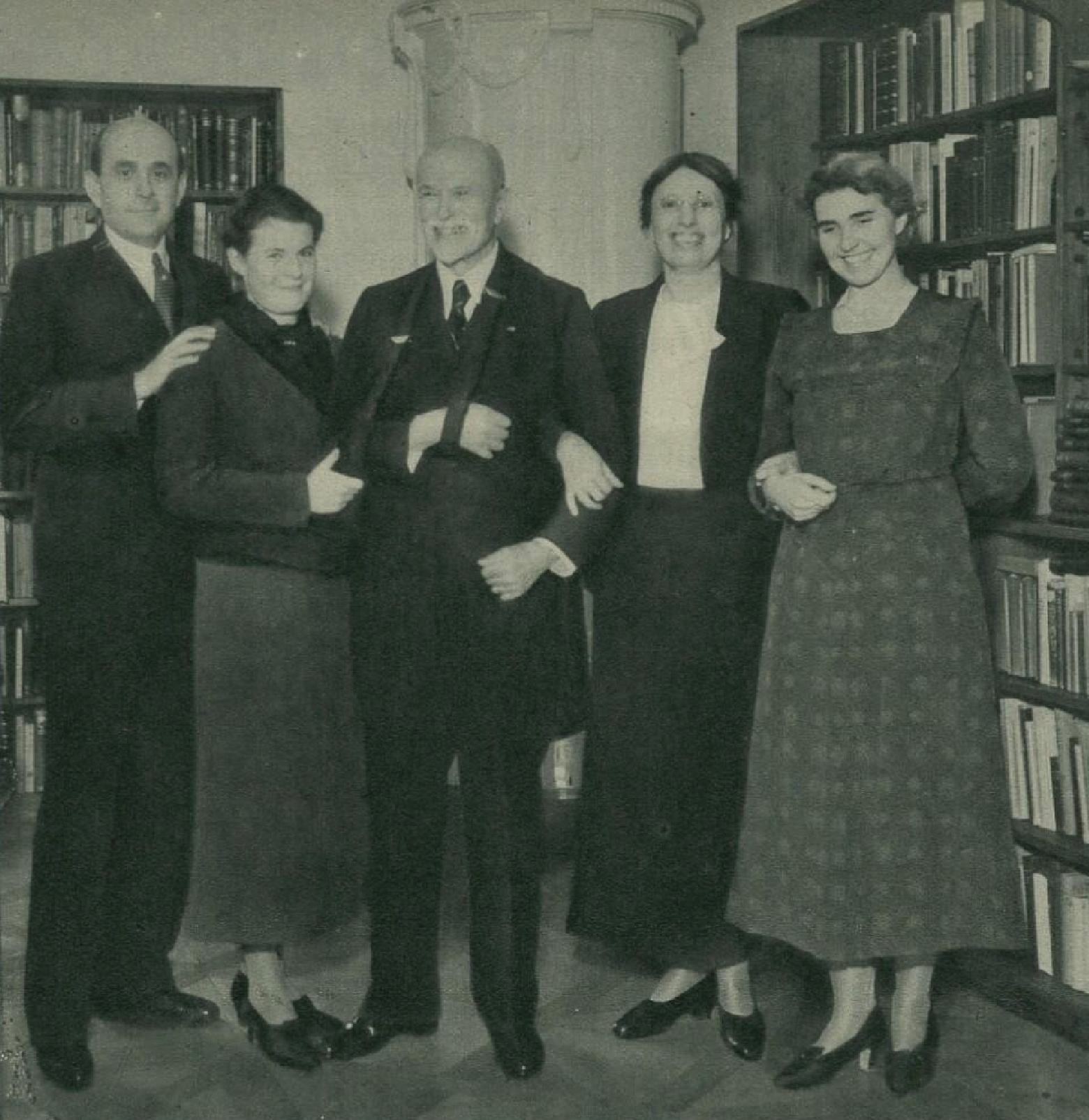 Anna Masaryková (1911-1996), česká historička umění a výtvarná kritička